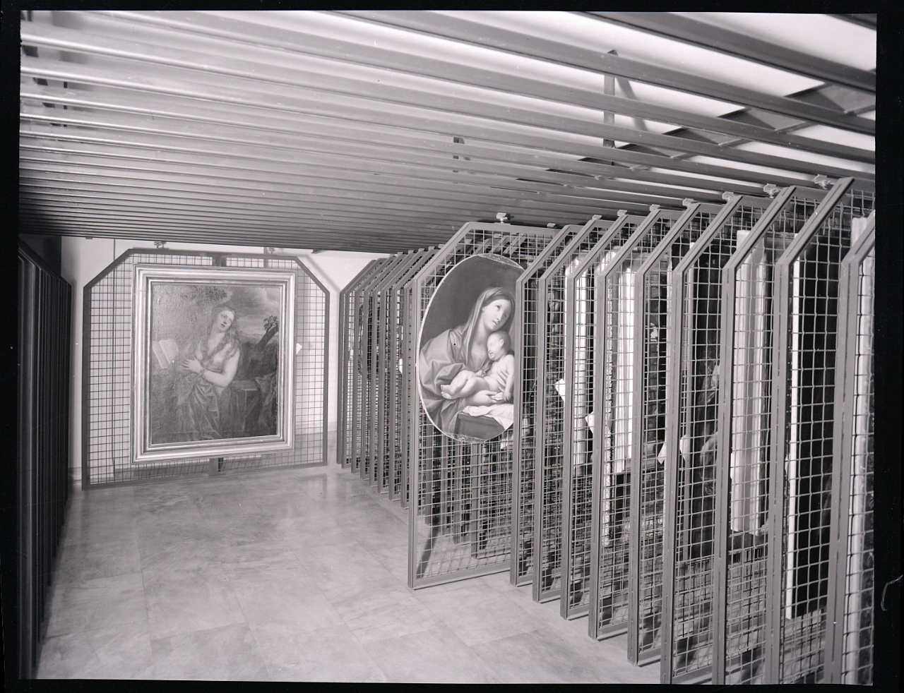 Servizio fotografico : Genova, 1963 / Paolo Monti. - Buste: 2, Fototipi: 2 : Negativo b/n, gelatina bromuro d'argento/ pellicola ; 10x12. - ((Serie costituita da 2 buste sciolte di negativi identificati con una doppia numerazione: 25601 (46382), 25651(46393). - La doppia numerazione potrebbe corrispondere ai lavori realizzati durante il periodo di attività del laboratorio e studio fotografico "Foto Studio 22", società che risulta essere stata aperta il 10/04/1961, con partecipazione, nel ruolo di gerente, di Vincenzo Carrese. - Occasione: Documentazione del restauro e dell'allestimento ad opera dell'architetto Franco Albini. - Fonte: Quaderno di Paolo Monti: V. Appunti/ Museo Palazzo Rosso - Genova (s.d.), presso Archivio Paolo Monti